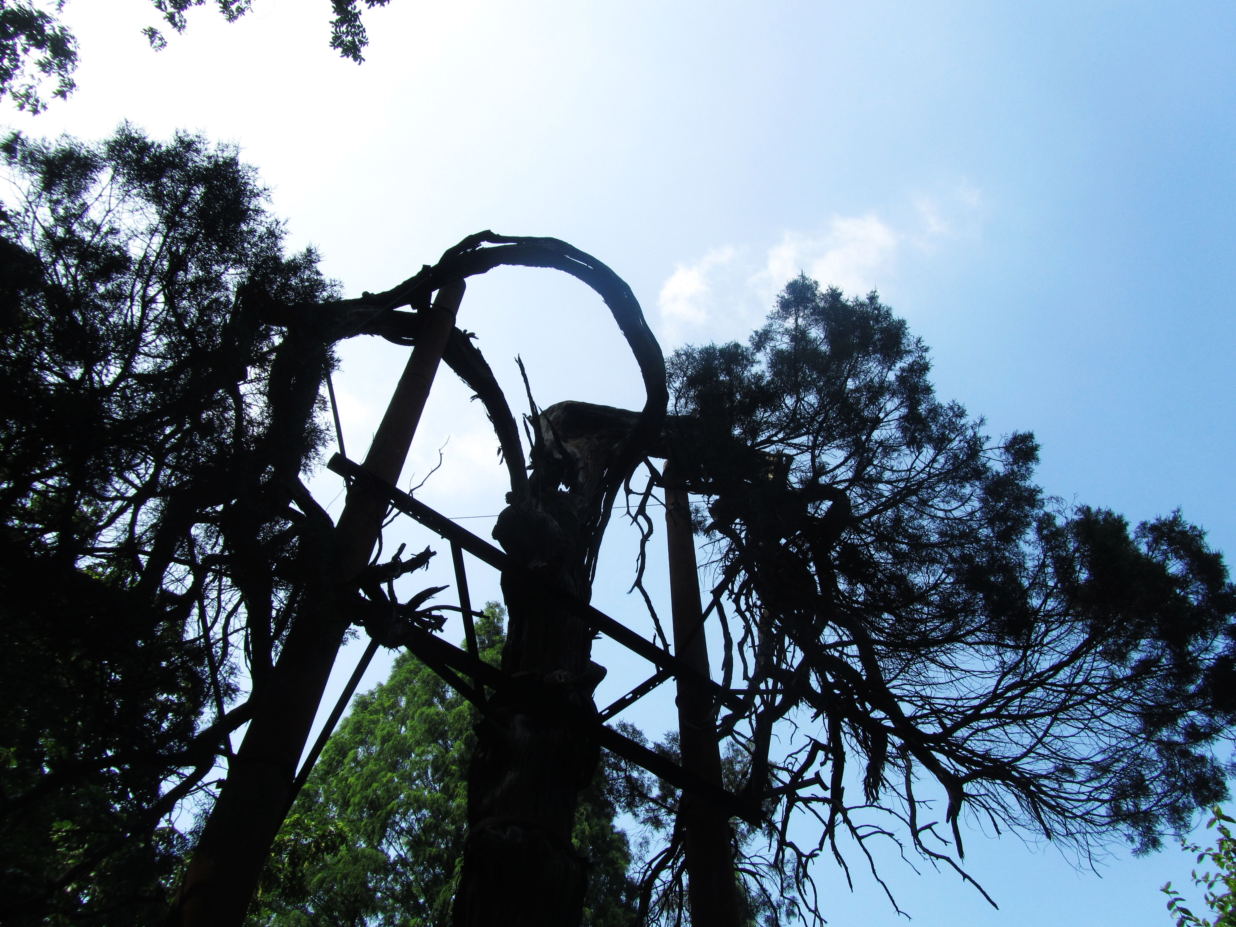 位于东南大学西牌楼校区西北角的六朝松，仰视。